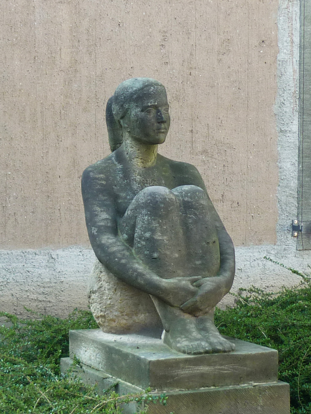 Skulptur Sitzende seitlich vom Barkhausen-Bau der TU Dresden